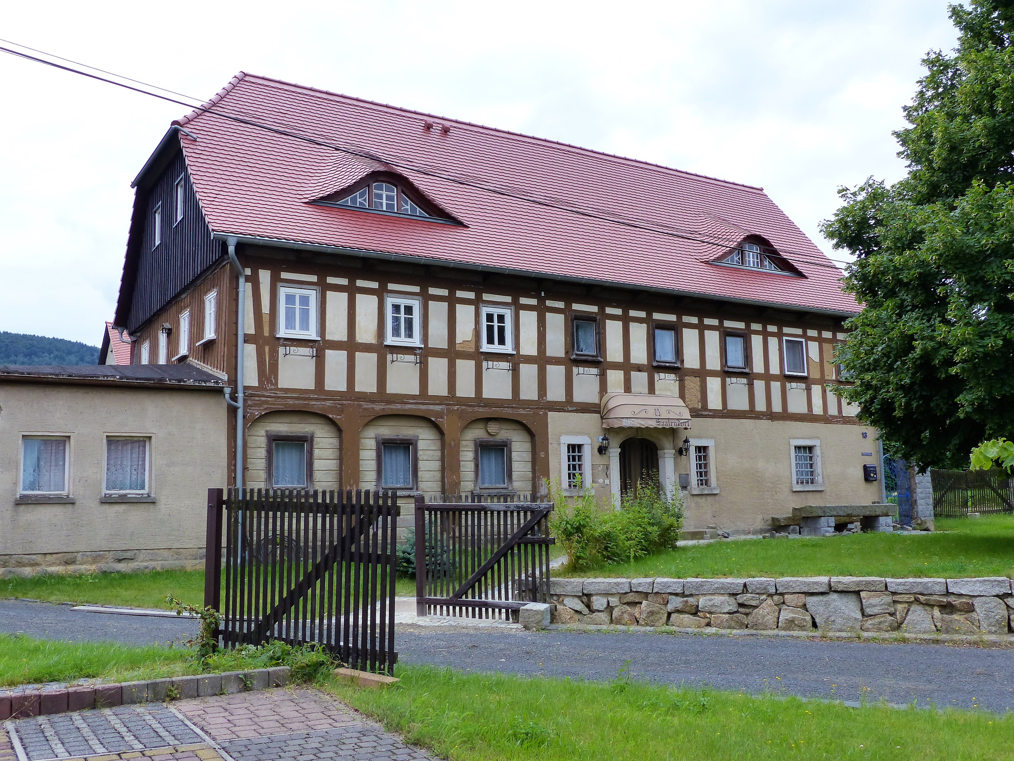 Denkmalgeschütztes Umgebindehaus, Saalendorf 13, Waltersdorf